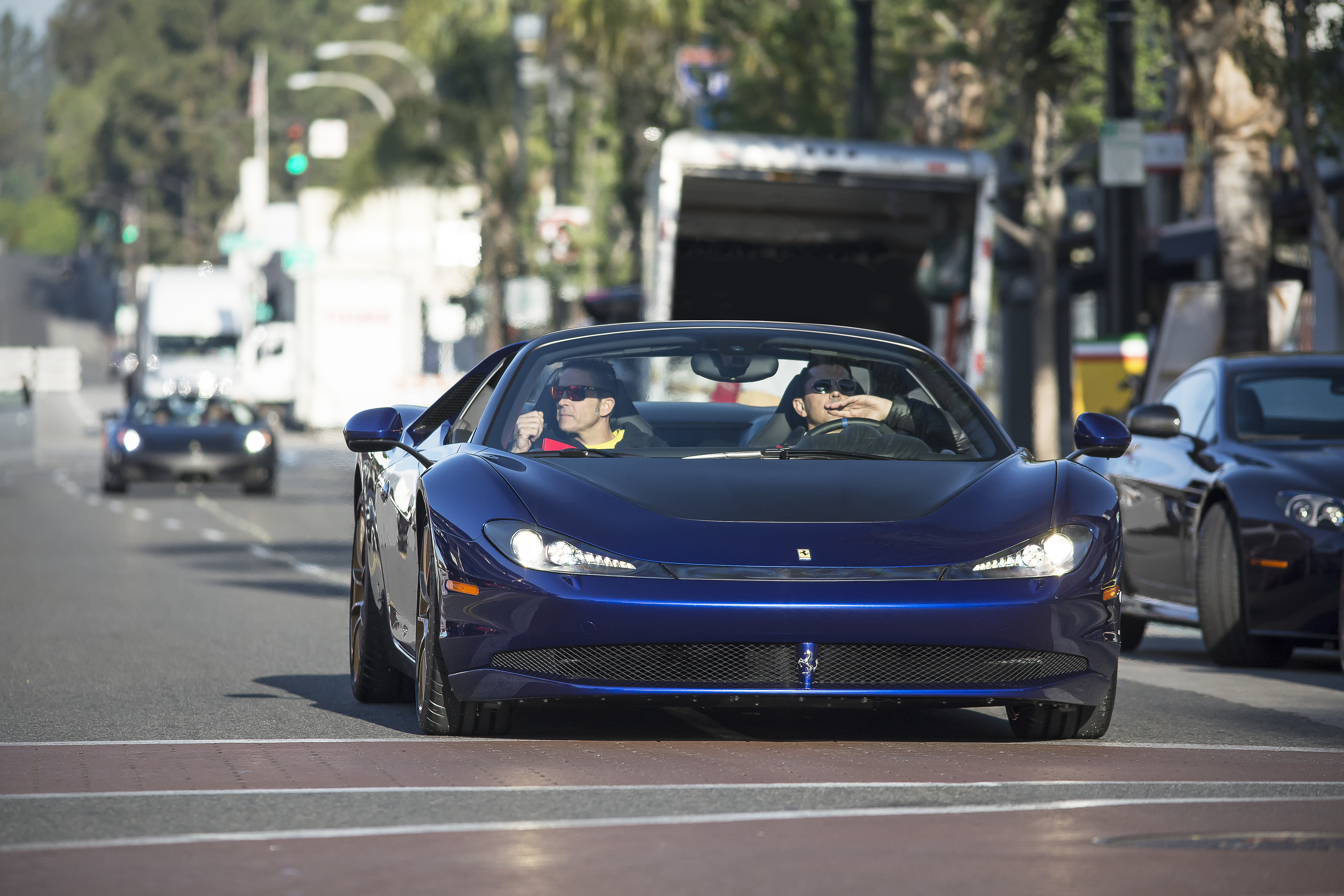 Ferrari Sergio (1 of 6) pulling up to Concorso Ferrari in Pasadena California.